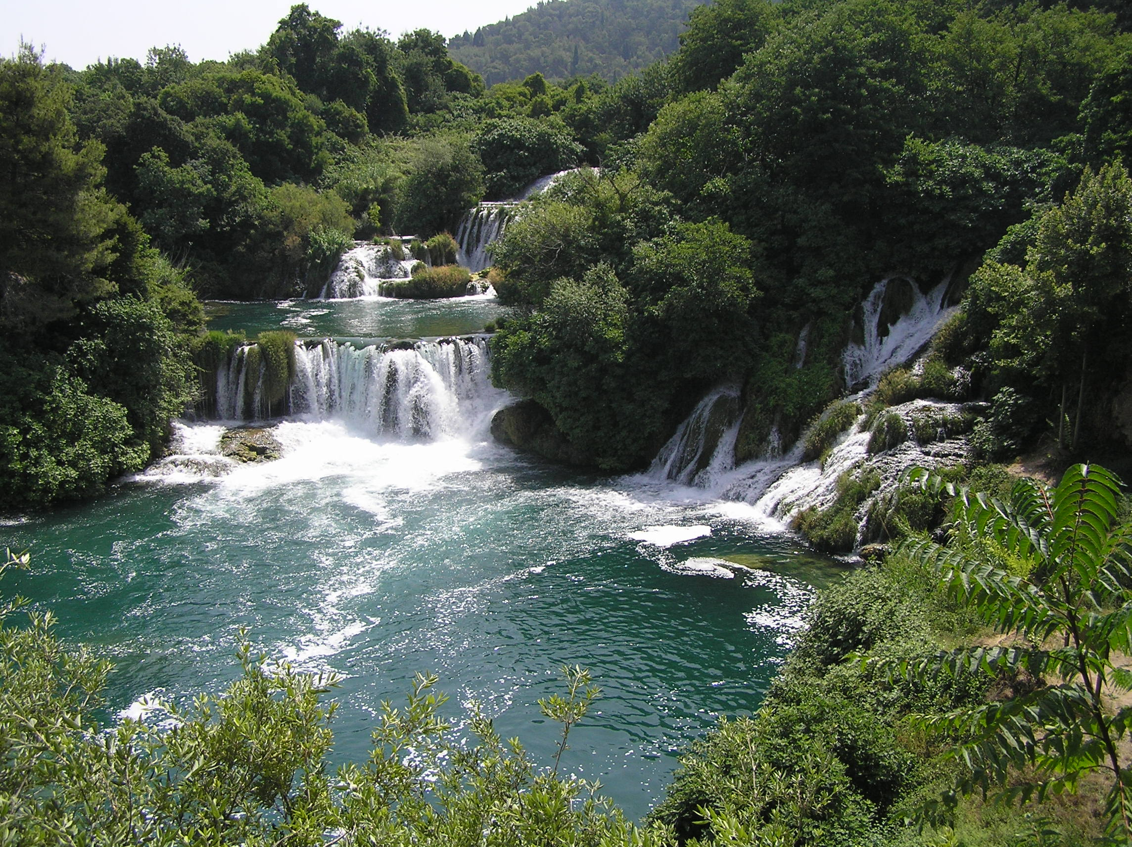 Krka National Park